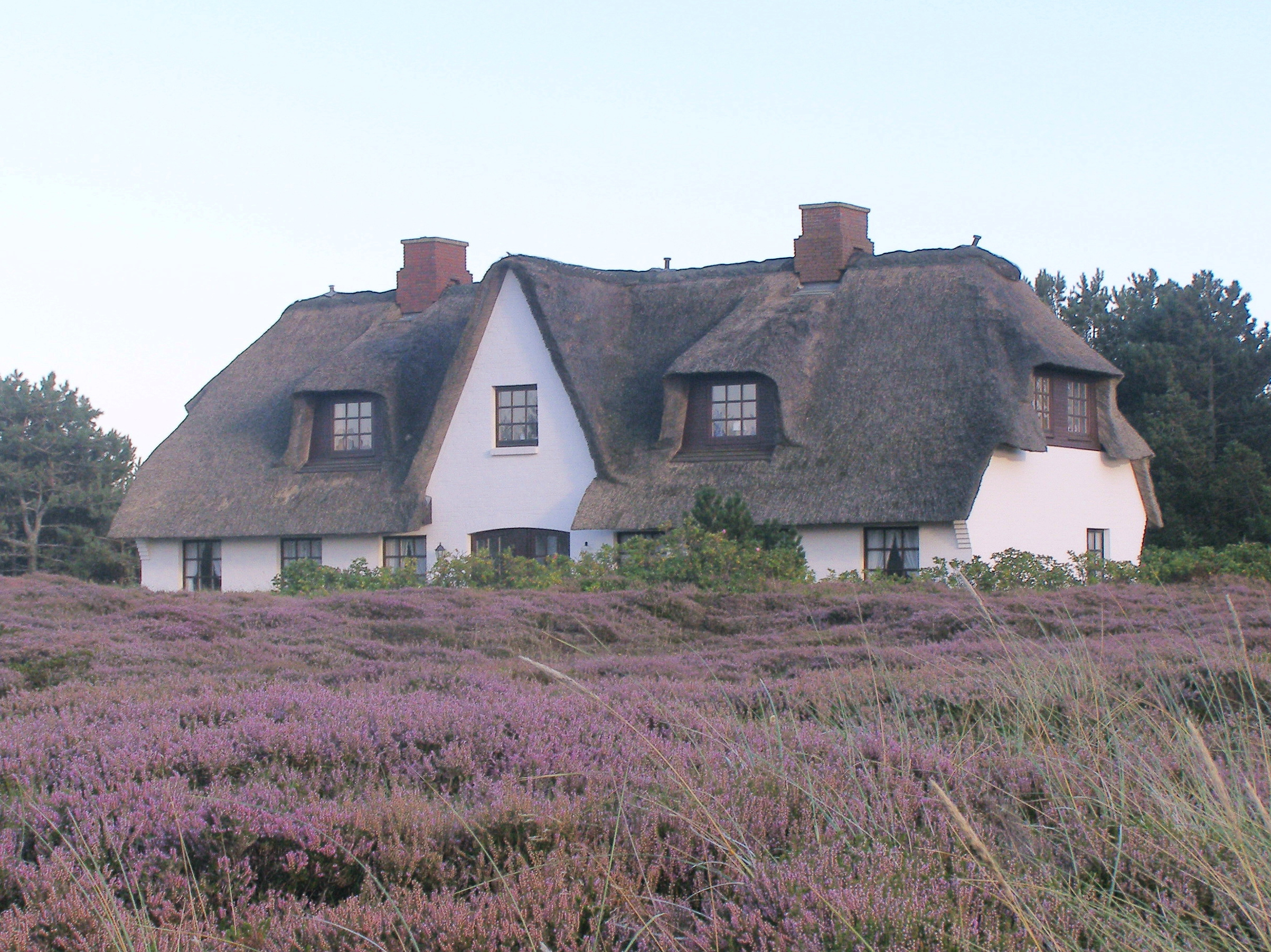 Frisian house at Munkmarsch (Sylt, Germany) Friesenhaus bei Munkmarsch (Sylt) Fríské stavení u obce Munkmarsch (Sylt, Německo)